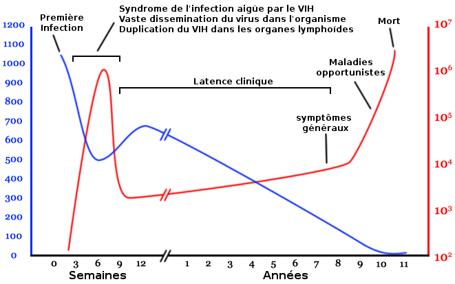 Diagramme de l'évolution de l'infection par le VIH (version sans légende pour la charge virale et le taux de lymphocytes)